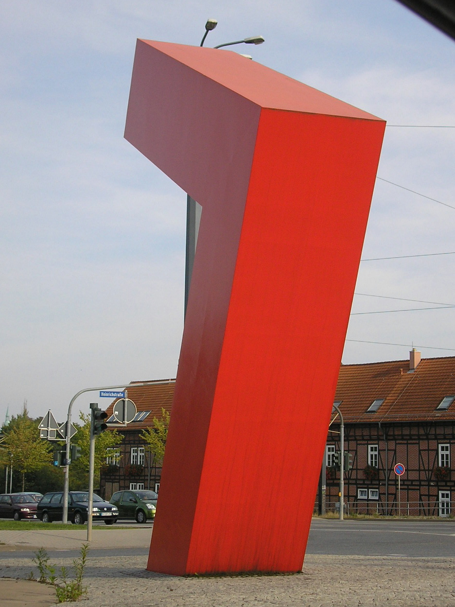 Erfurt, Verkehrsknoten "Binderslebener Knie", Tunnel und Brückenbauwerk Motiv eines Winkels, umgesetzt als Betonreliefs an den Tunnelwänden und als Skulptur (Bild), Edelstahl, rot gefasst, 8 m hoch, von Jochen Scheithauer, München 2001